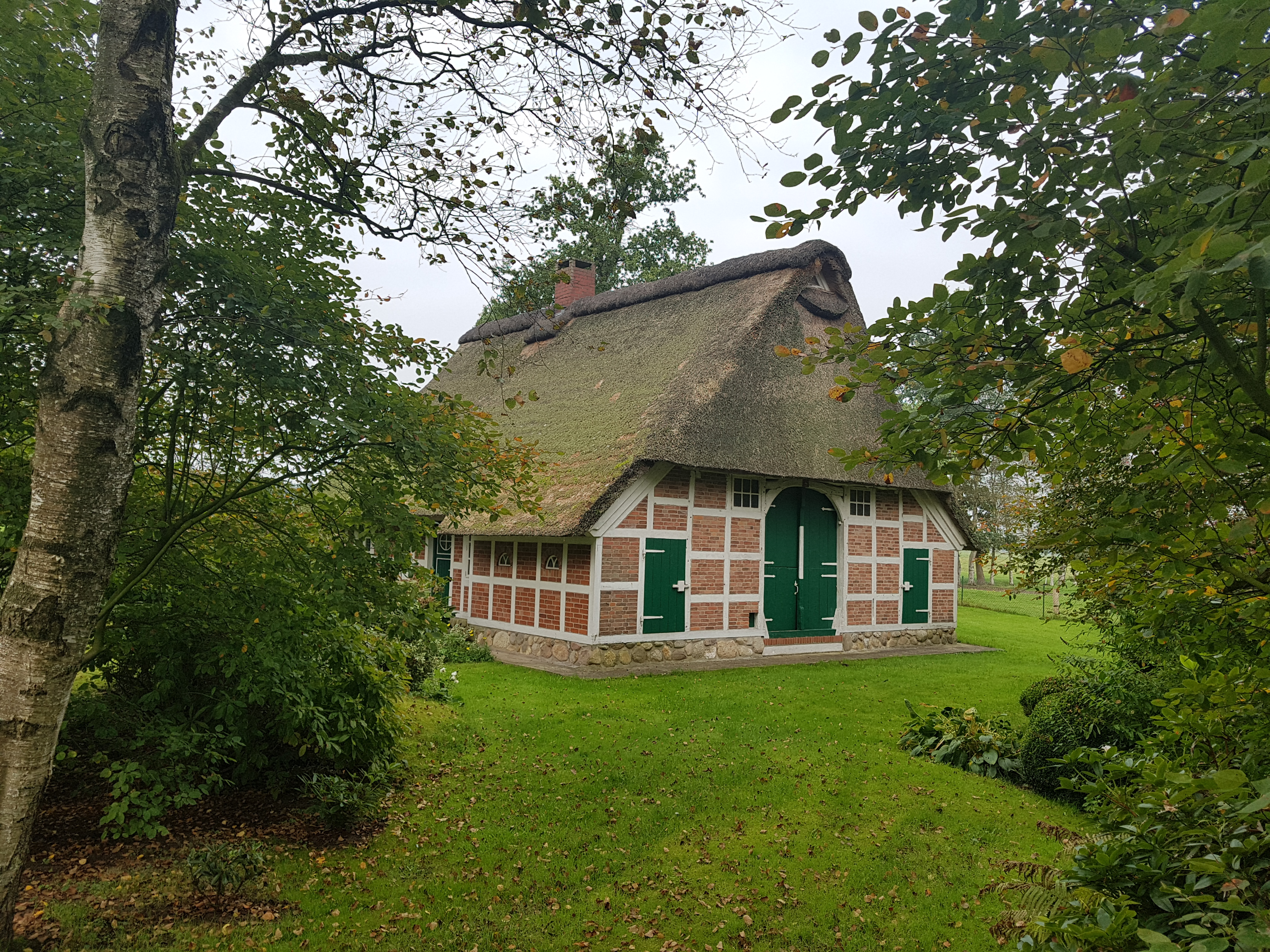 Ehmalig Buurnhuus in Ihlbeek